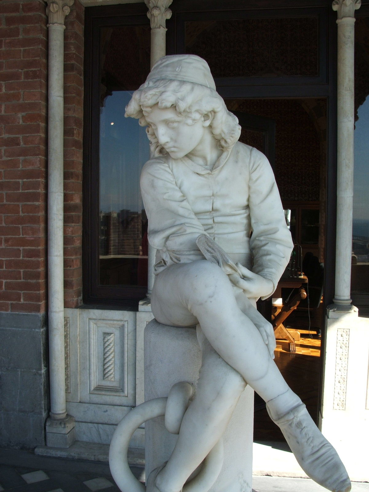 Immagine dalla città di Genova